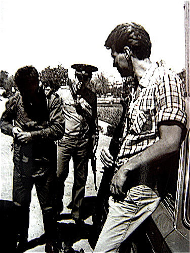 Додолев с «Калашниковым» (Узбекистан, 1988)